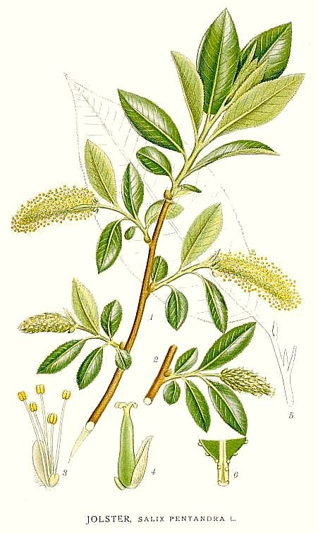 Original Description Jolster, Salix pentandra L.